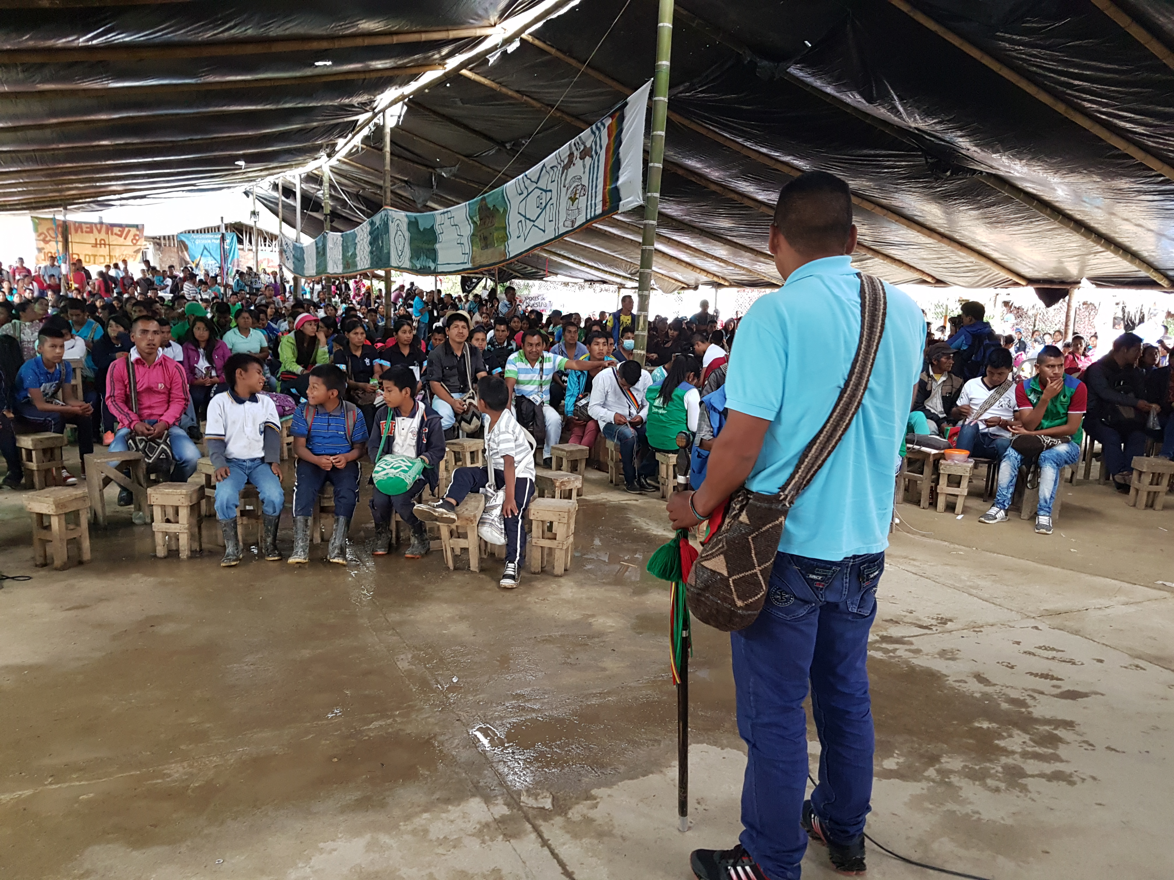 asamblea comunitaria del Proyecto Global en la que la comunidad toma decisiones guiadas por las autoridades indígenas